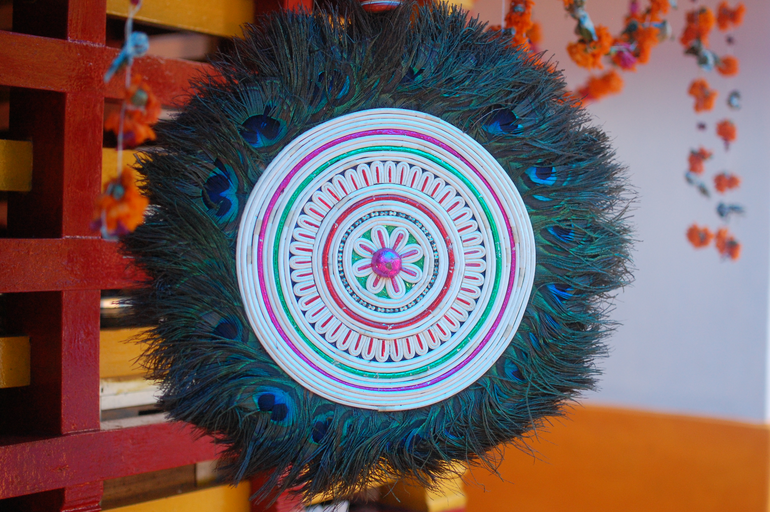 ആലവട്ടം